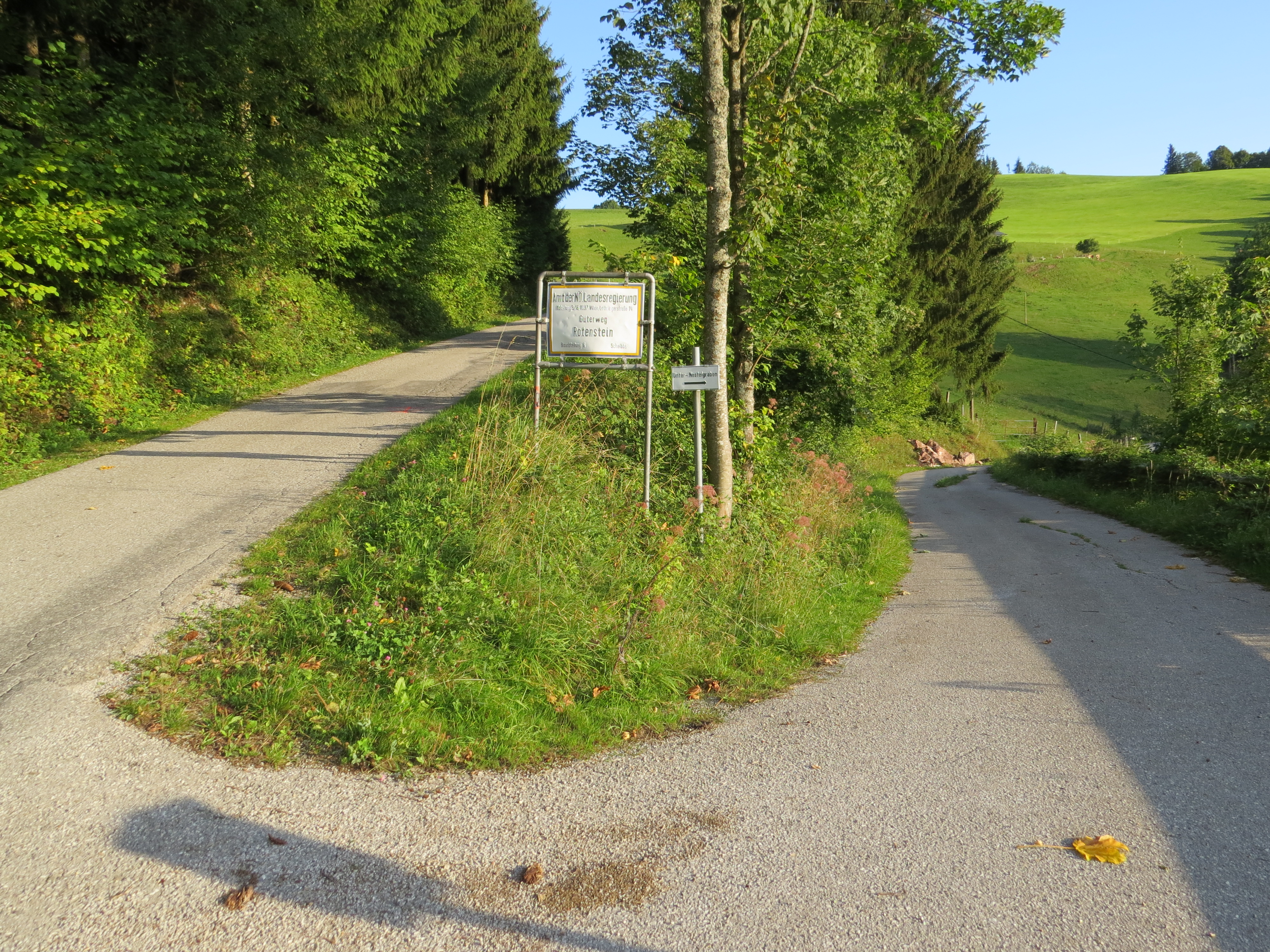 2017-09-15 Frankenfelsberg